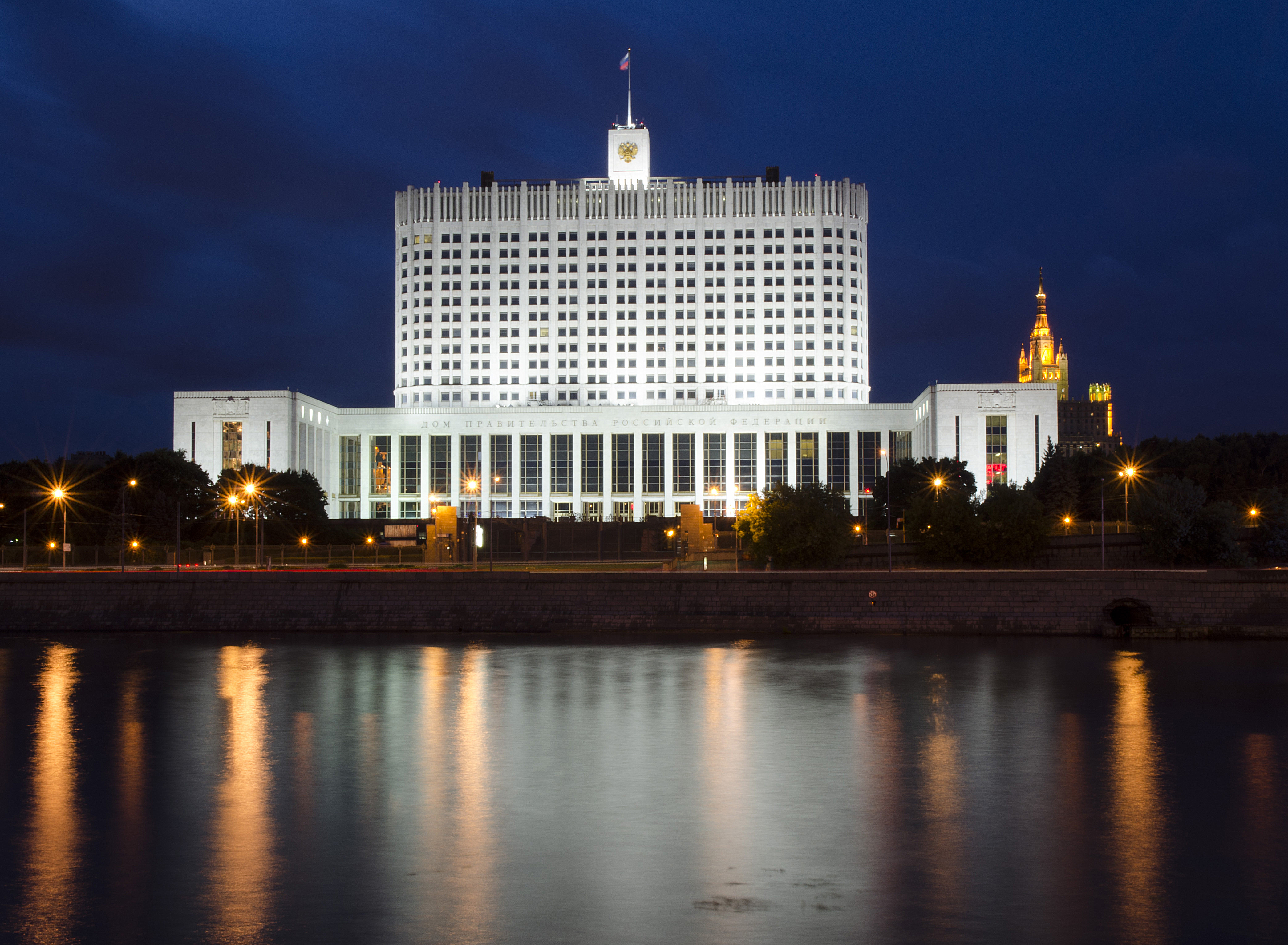 Дом Правительства Российской Федерации ночью.